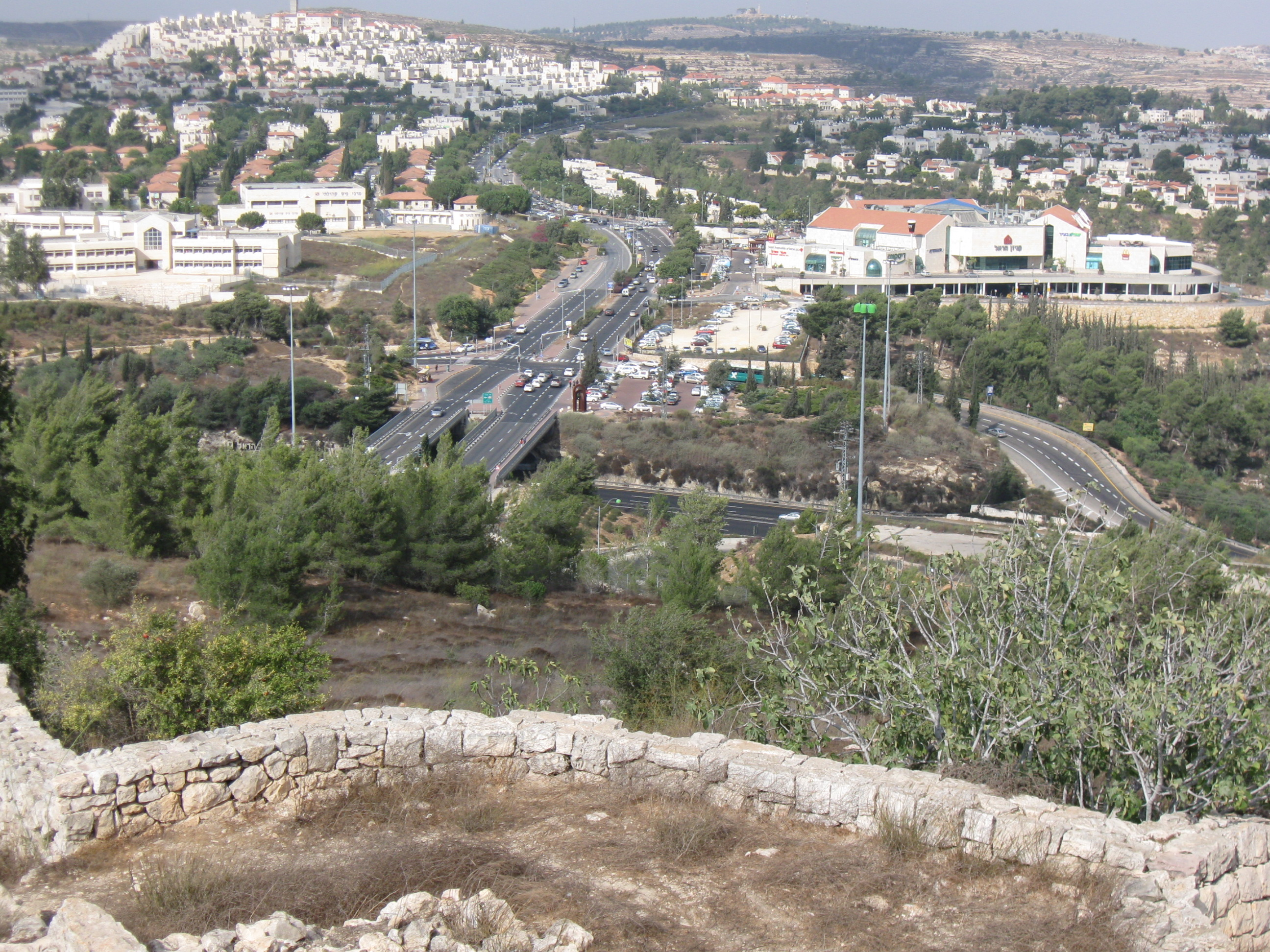 מבט על מבשרת ציון מכיוון הקסטל